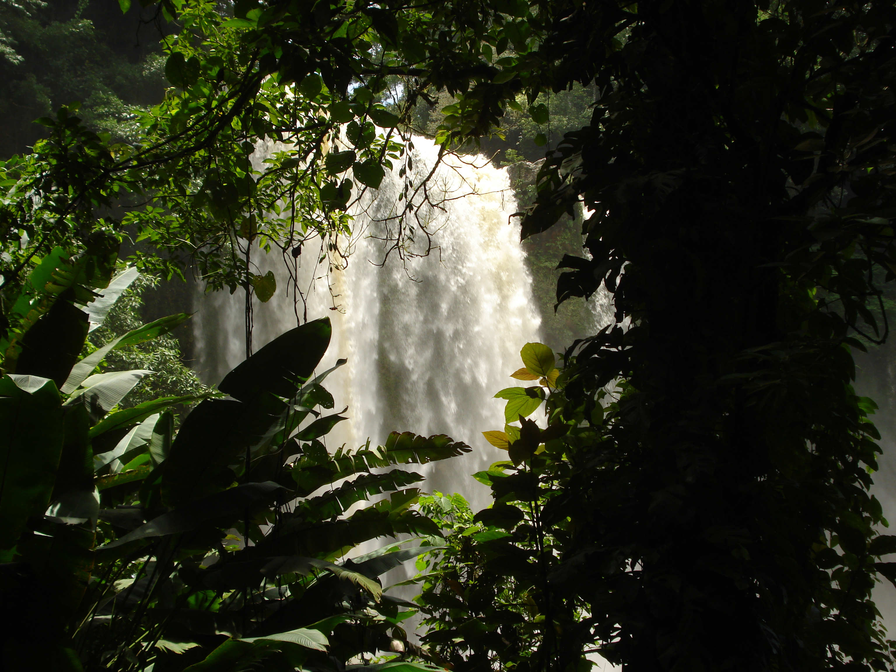 Entre la espesa selva, se aprecia la Cascada Misol-ha, Chiapas.